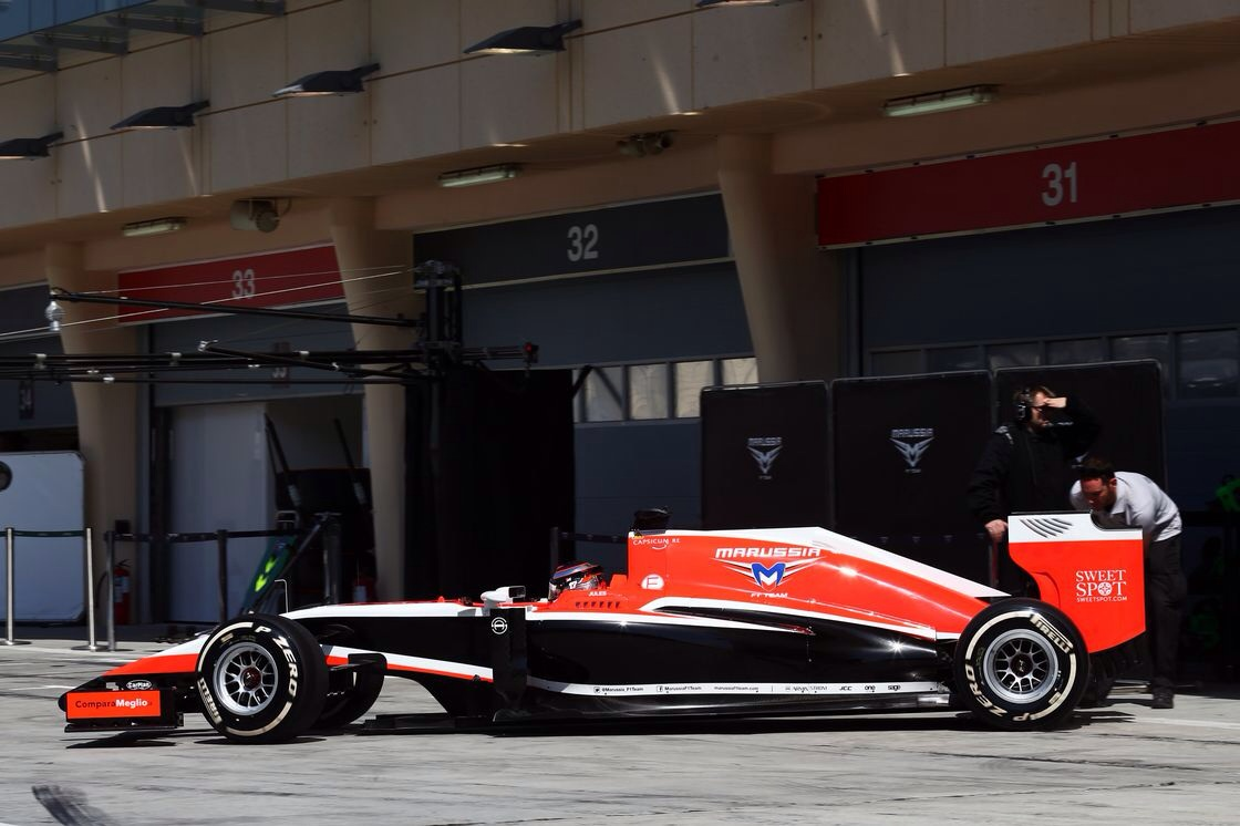 Marussia MR03 i depå